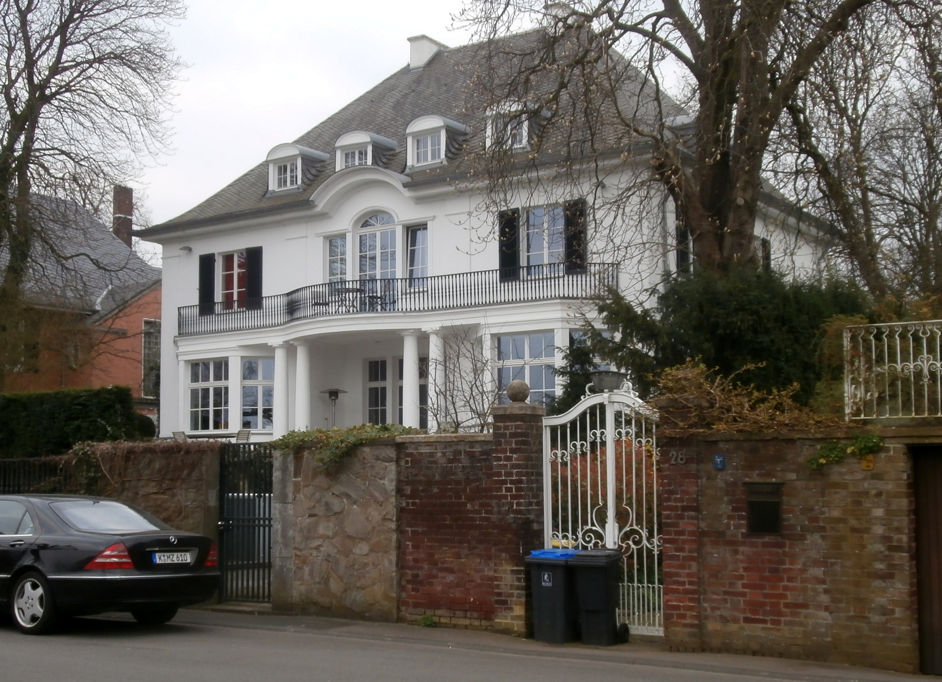 Denkmalgeschützte Villa, Uferstraße 29, Köln-Rodenkirchen